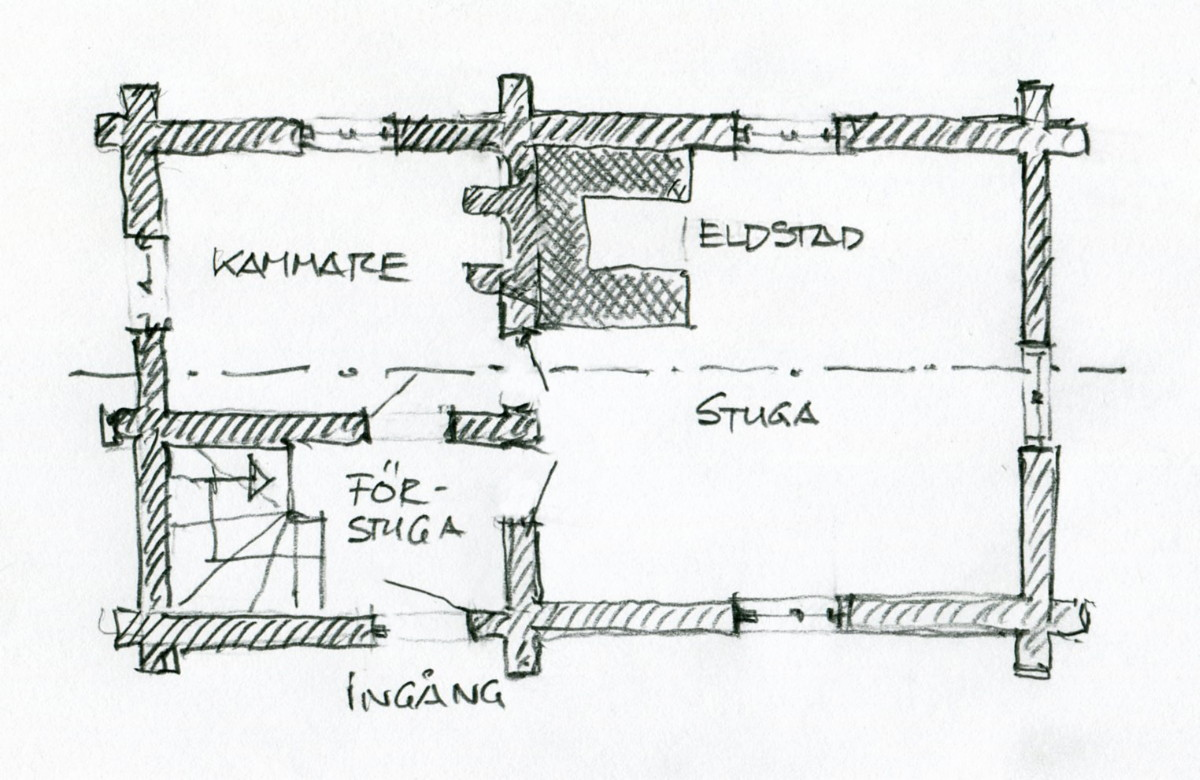 Enkelstuga planritning